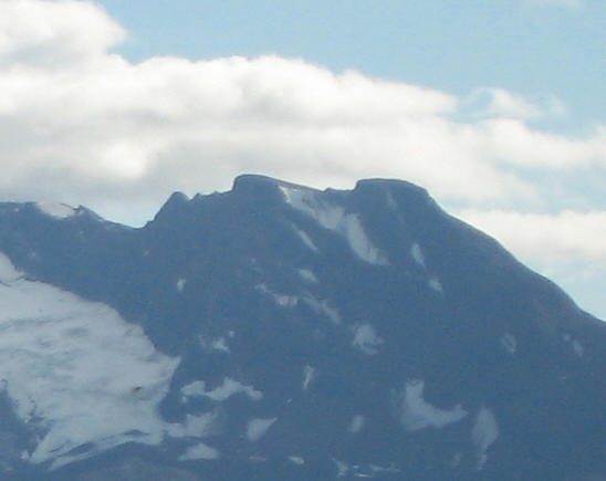 "Ansiktsprofilen" på Den sovende dronning